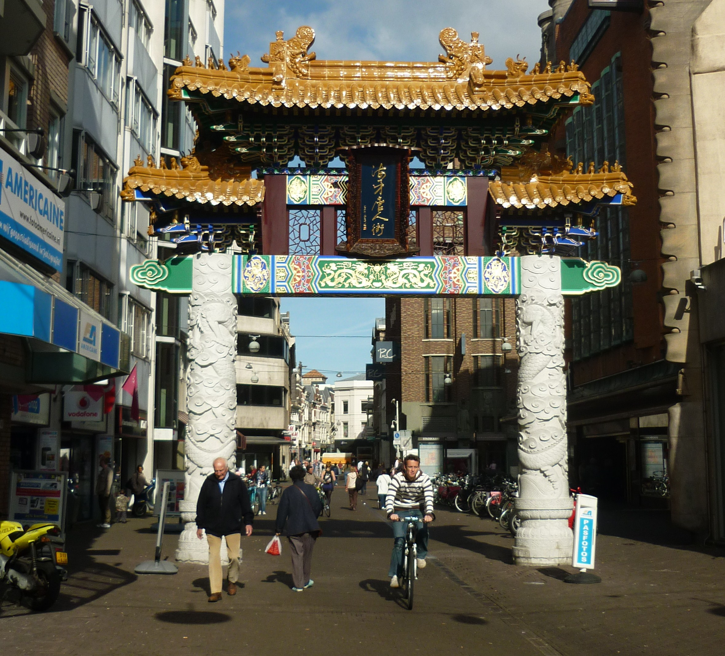 Toegangspoort naar Chinatown in Den Haag